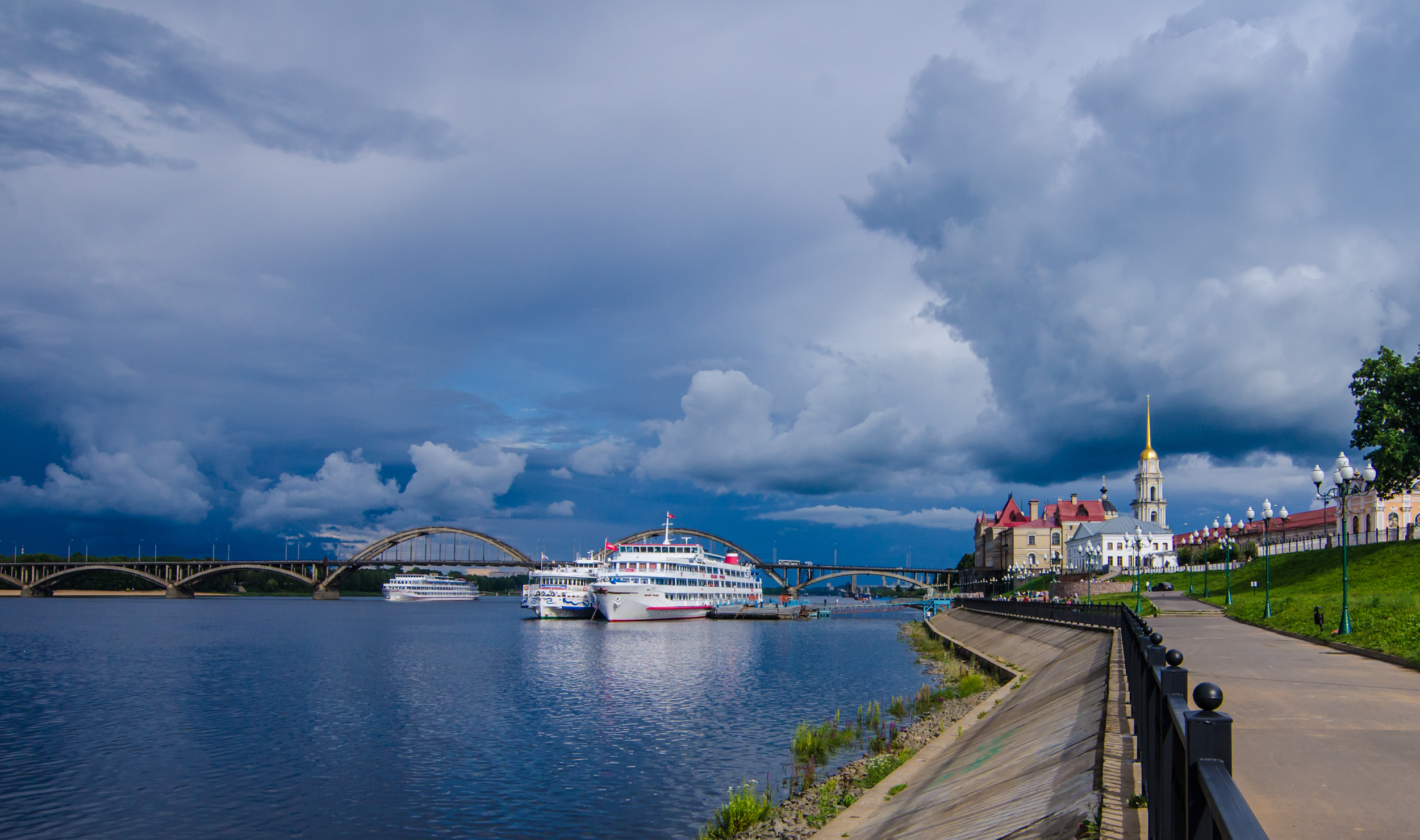 Рыбинский историко-художественный и архитектурный музей (музейный комплекс): Рыбинск, Ярославская область